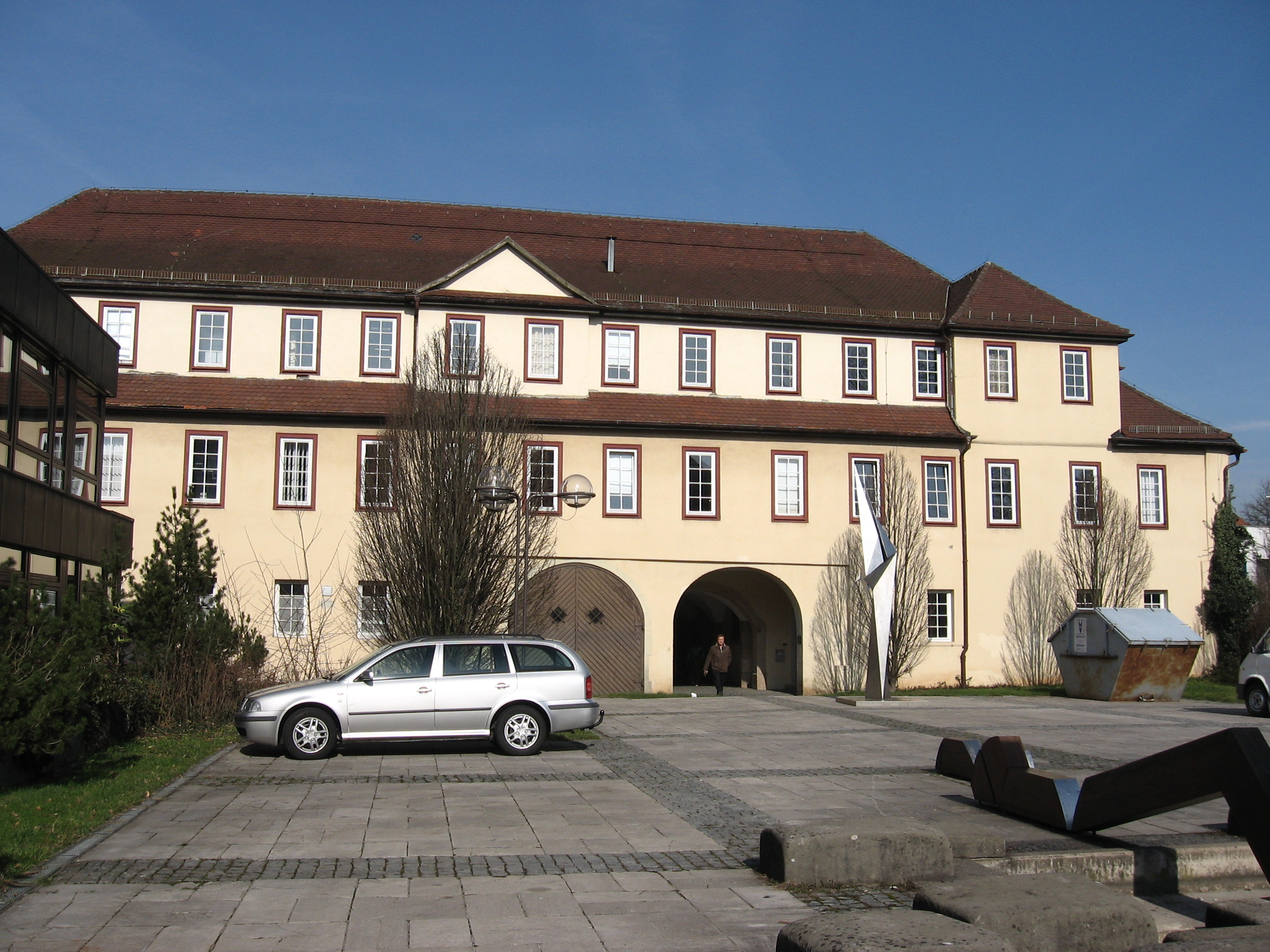 Jagdschloß Schorndorf (Württ.) hunting lodge Schorndorf, Germany